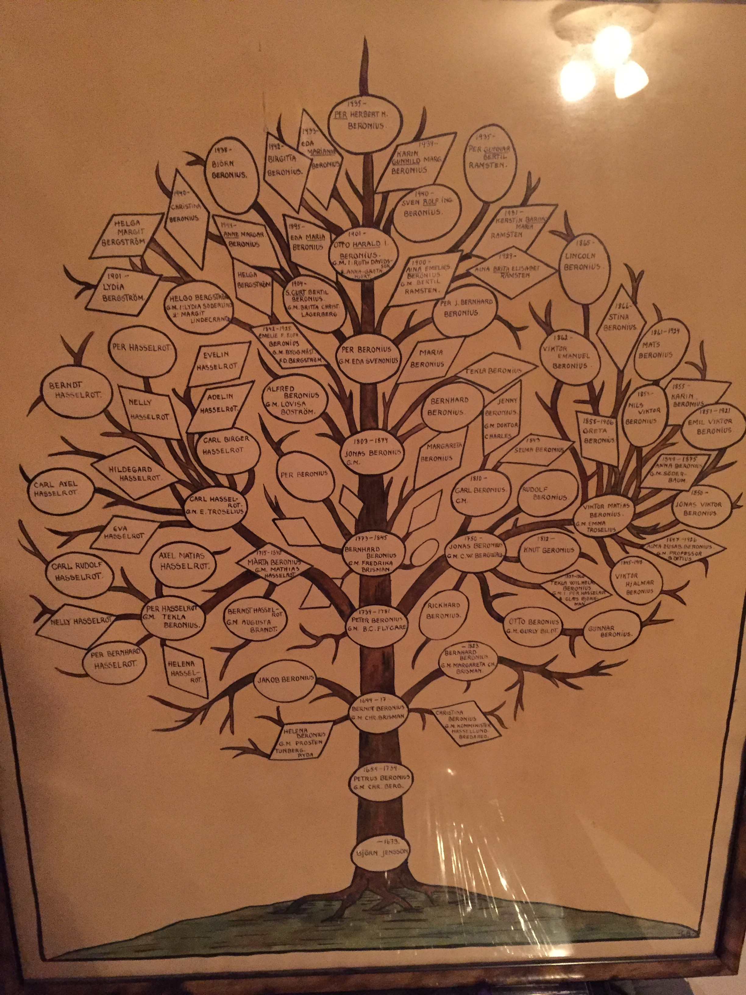 Bild av släktträd upprättat av Curt Beronius på 1950-talet genom egen släktforskning.